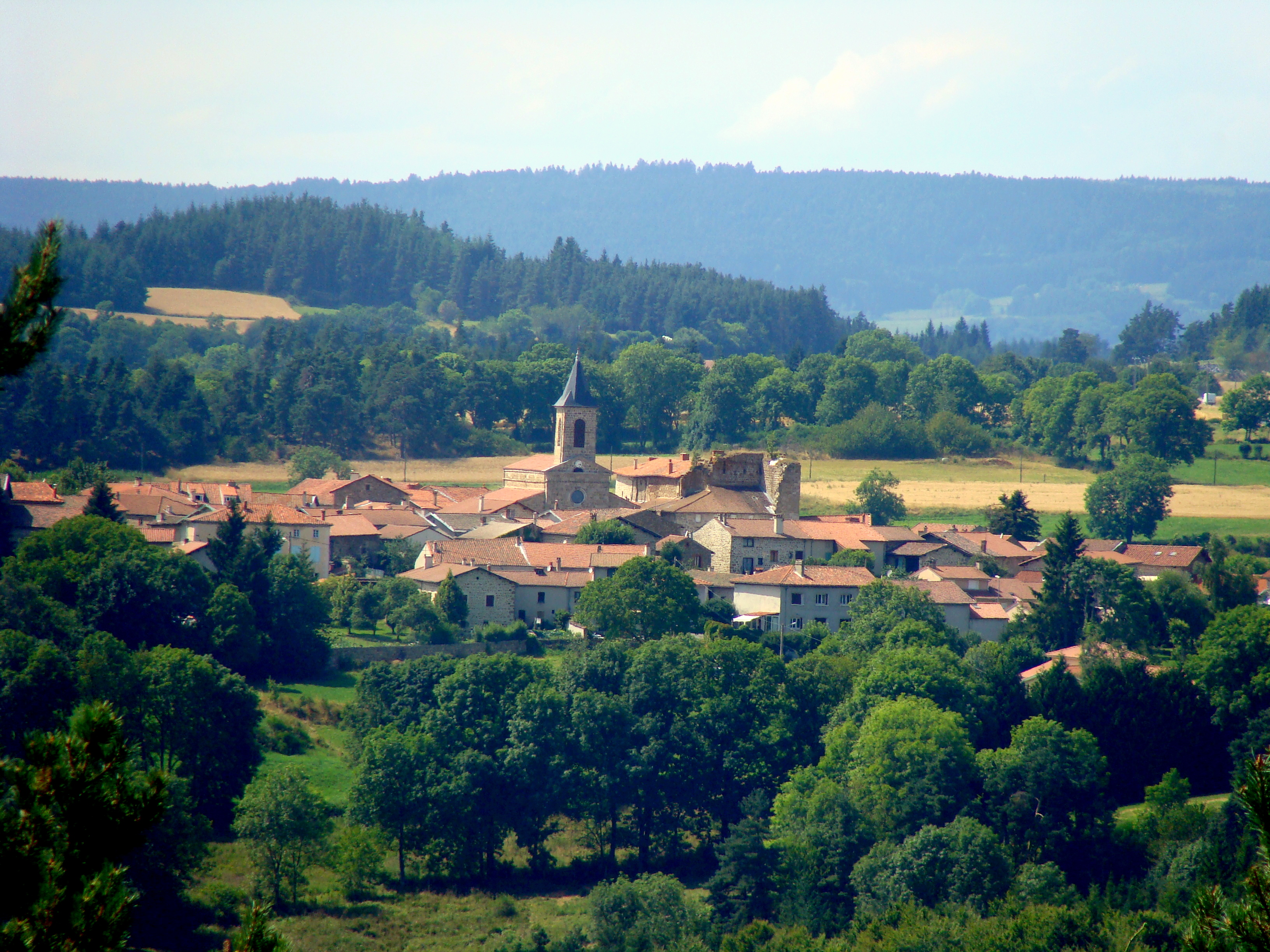 Prise de vue depuis Leignec